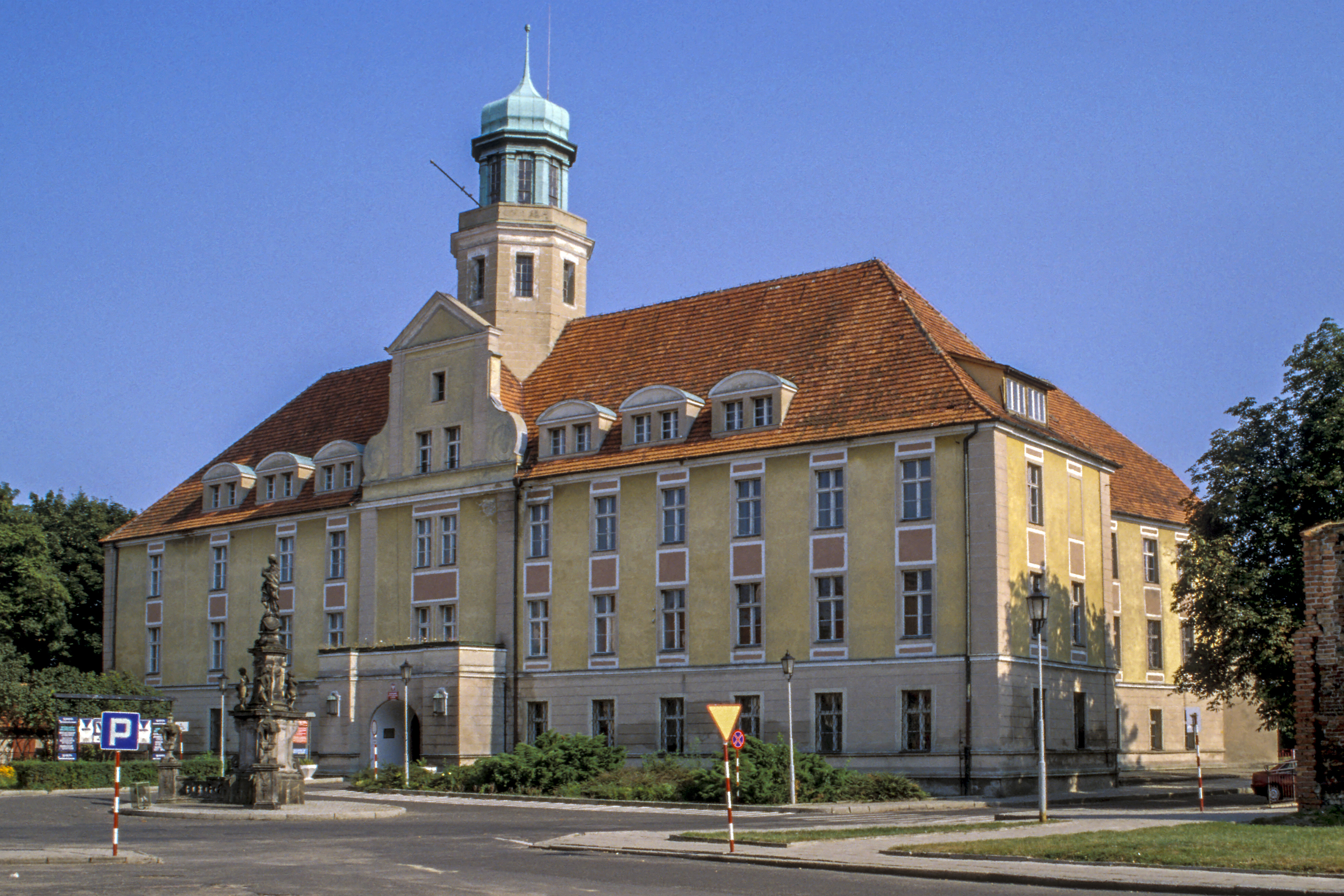 Wołów, pl. Piastowski 2 - zamek, ob. Starostwo Powiatowe, XVII, XX